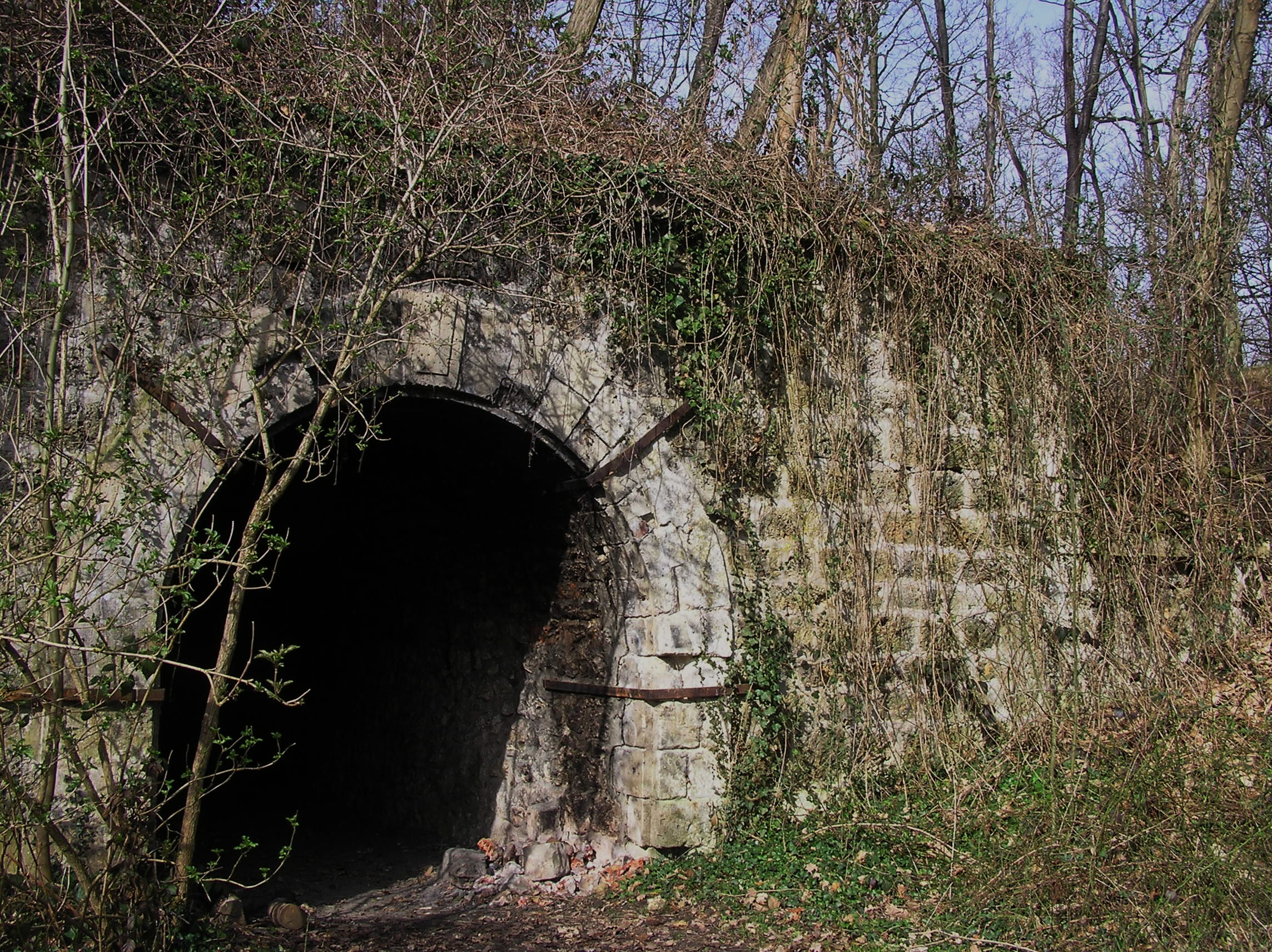 Batterie du Ravin de Bouviers mars 2008